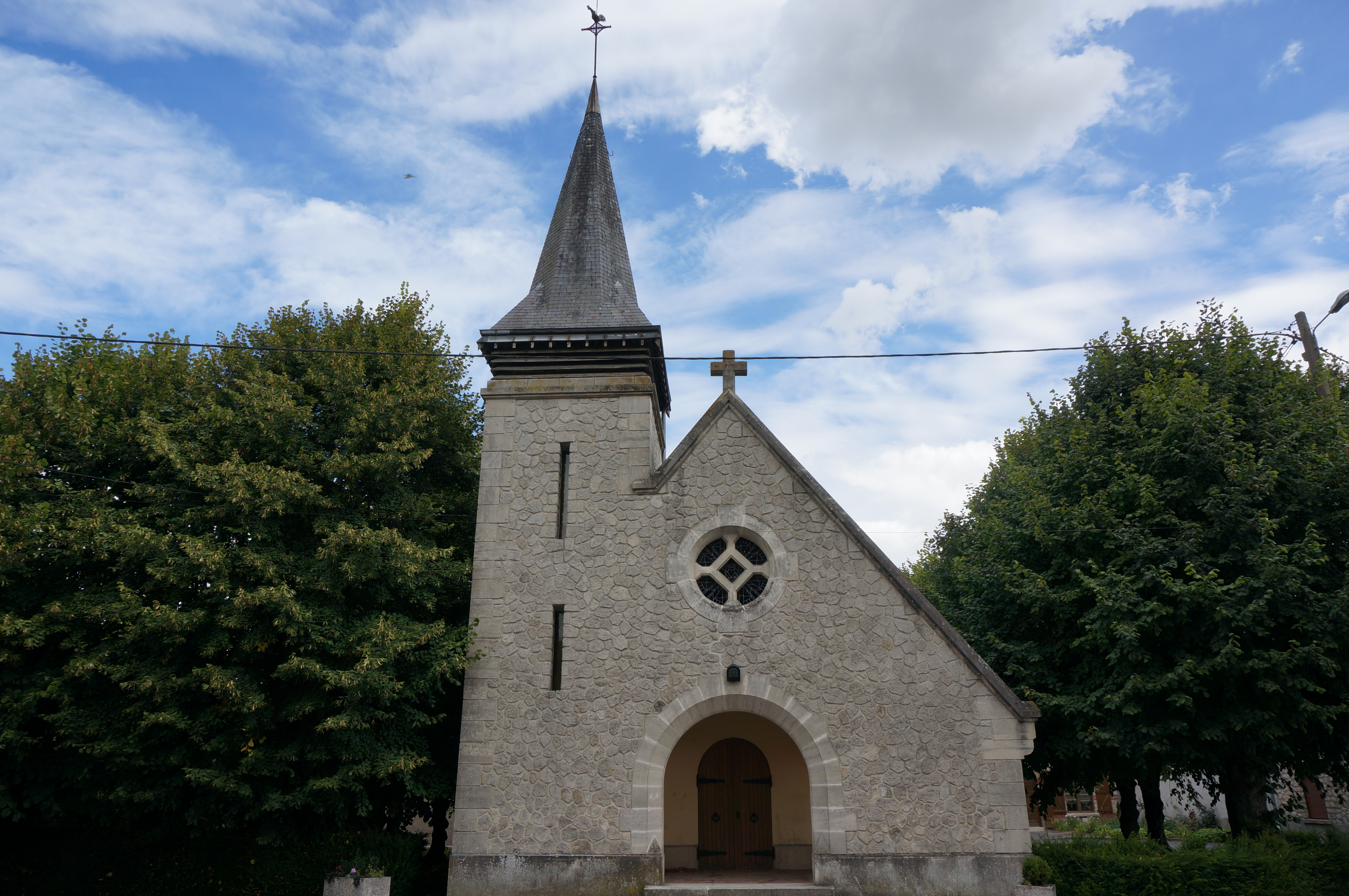 Vue de l'église du village .